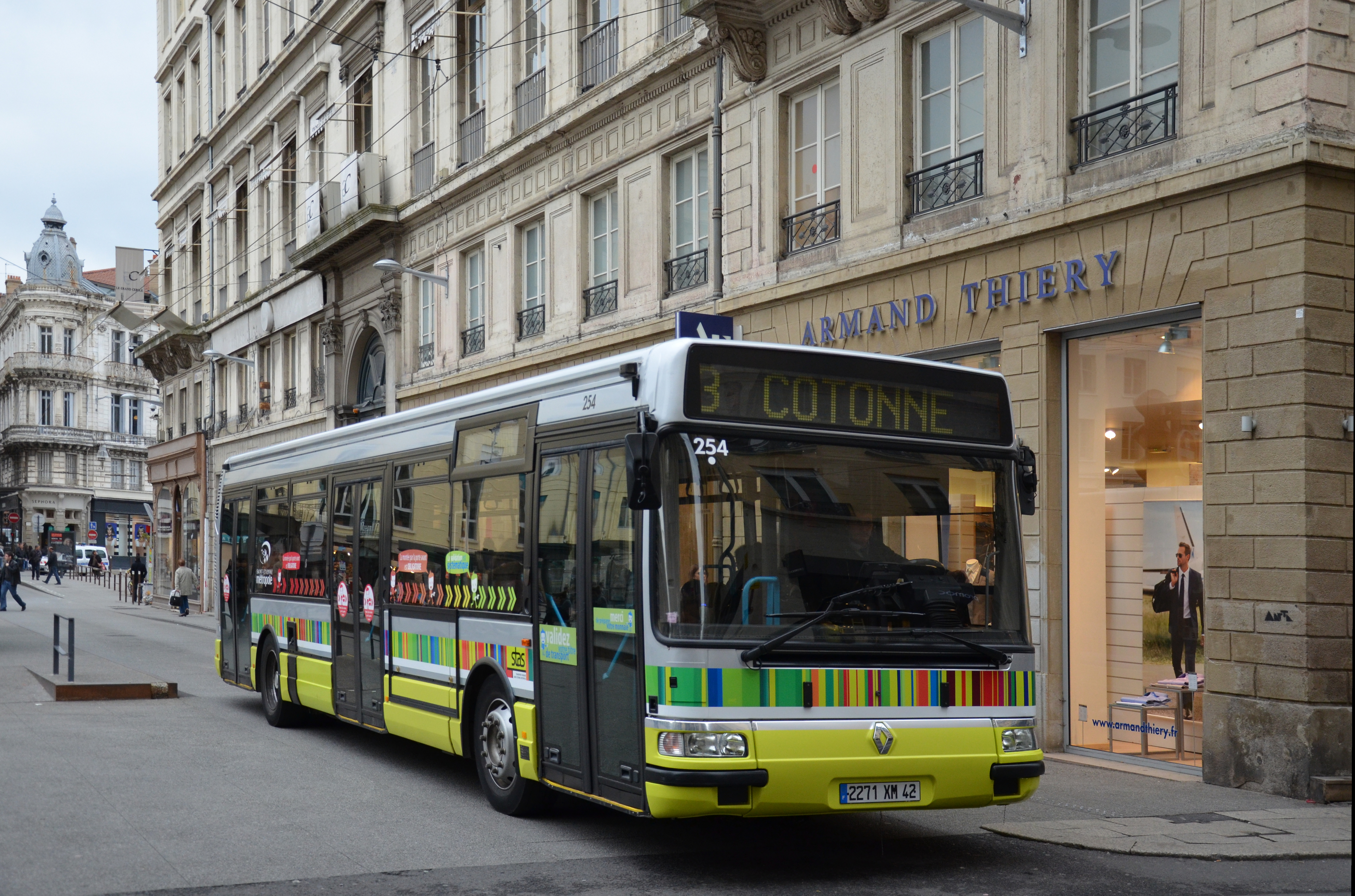 Renault Agora S n°254 sur la ligne 3 du réseau STAS de Saint-Etienne, à Place Carnot en direction de Cotonne.